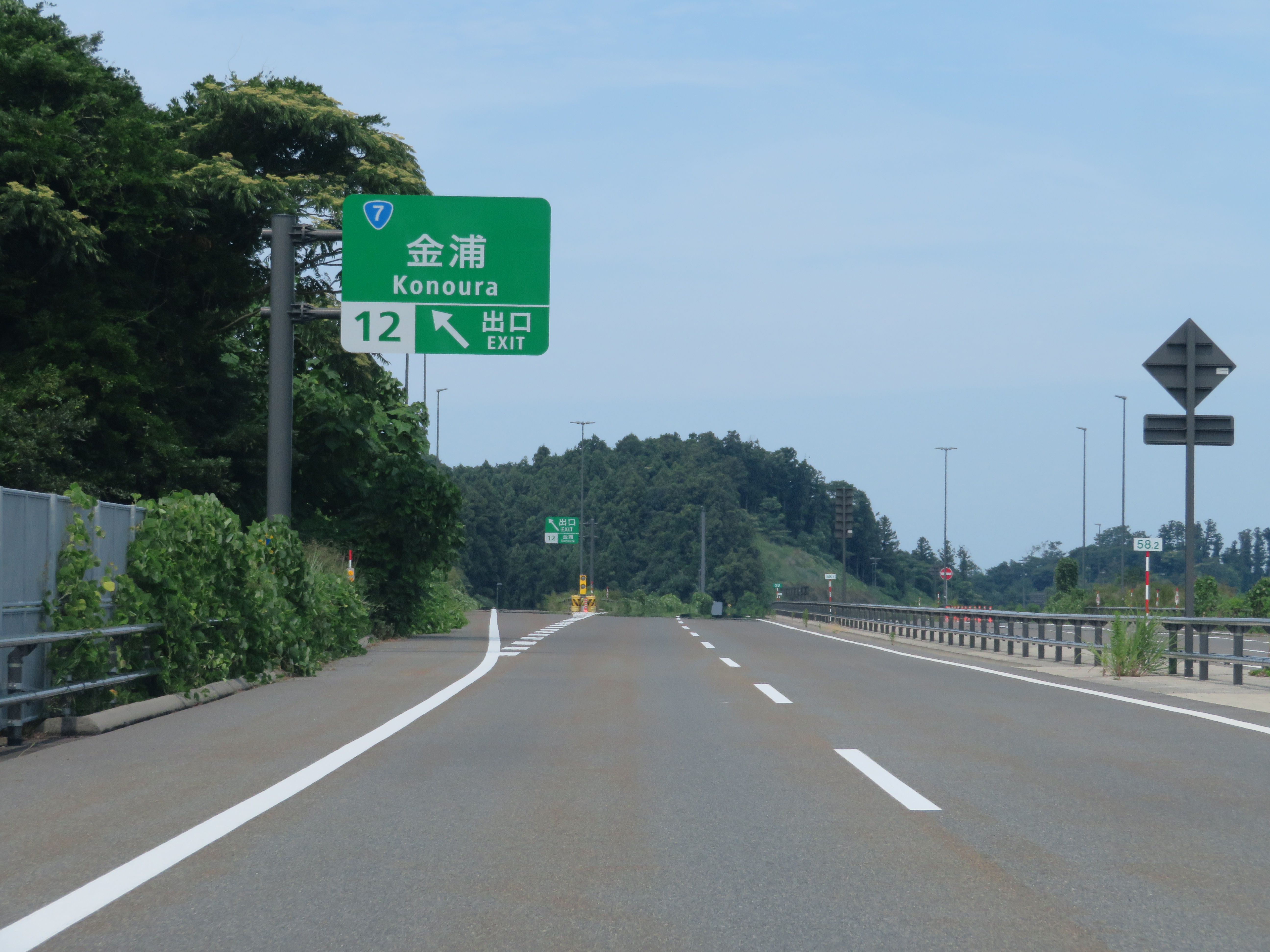 日本海東北自動車道金浦IC出口付近（象潟IC方面側から撮影）